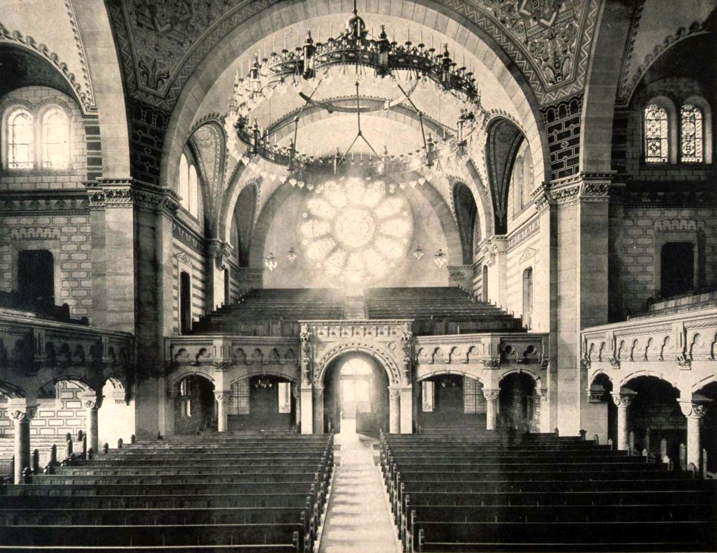 Strasbourg synagogue quai Kléber vue nef 1898-1940